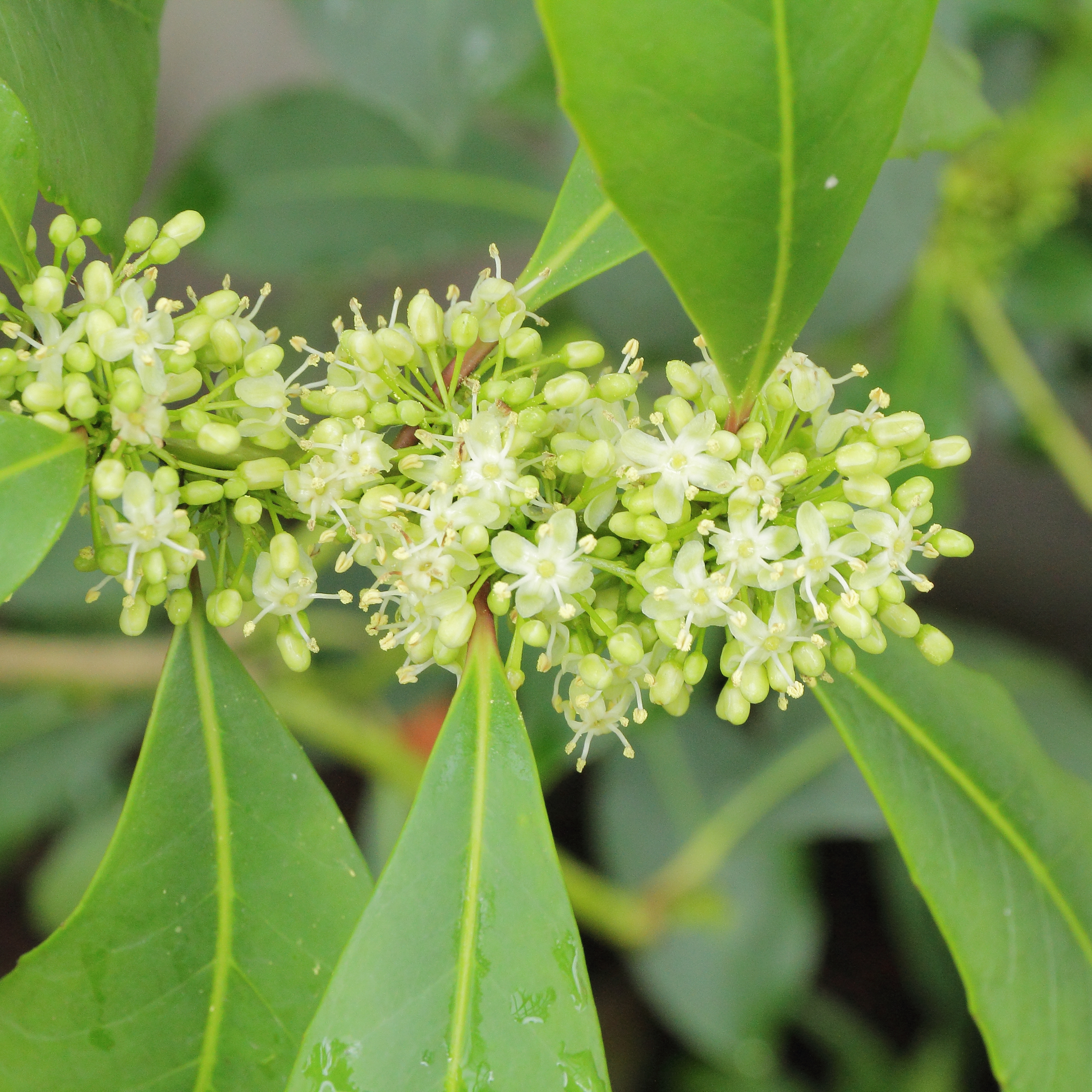 Ilex paraguariensis i Göteborgs Botaniska Trädgård.